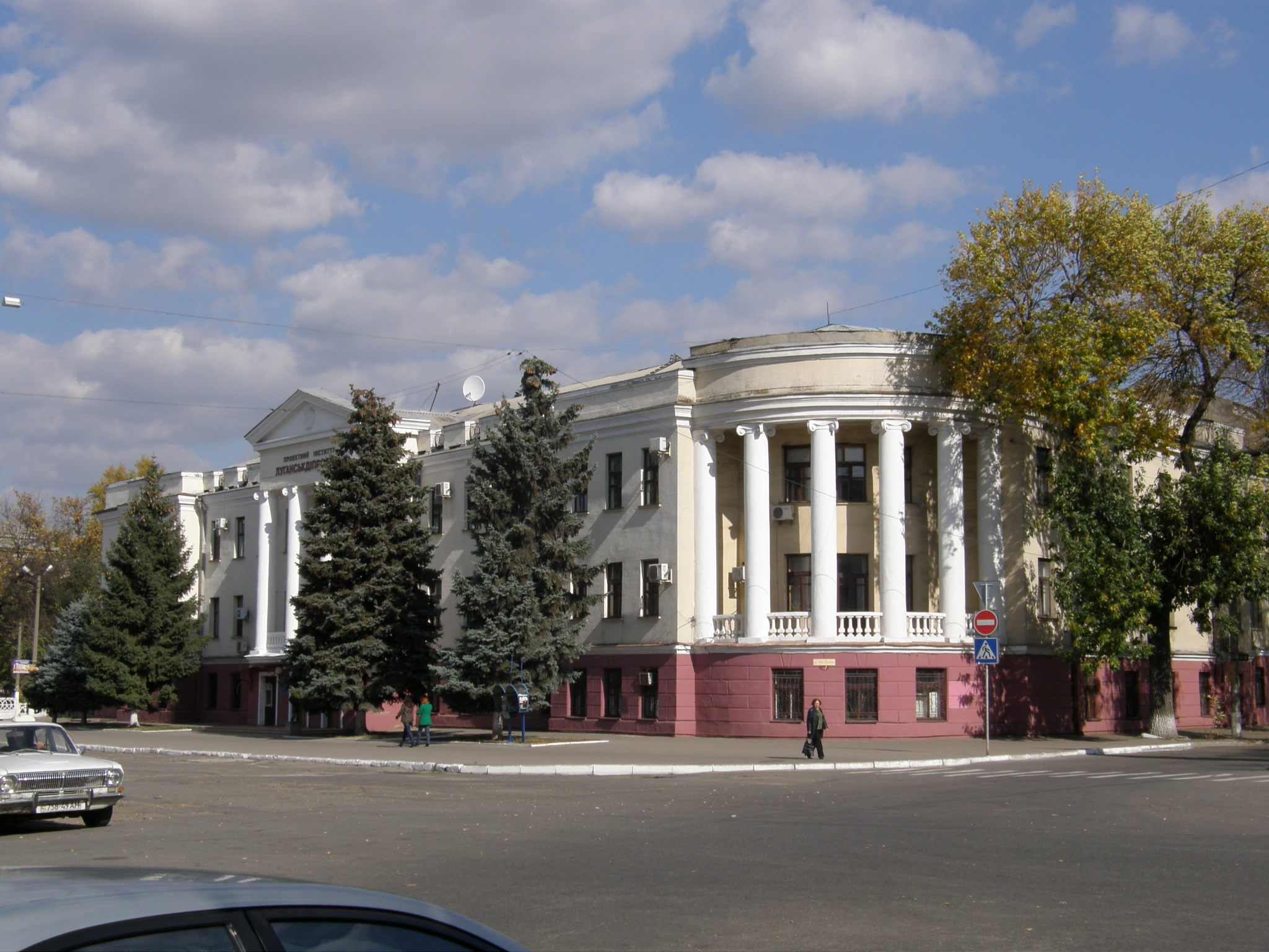 при самых загадочных